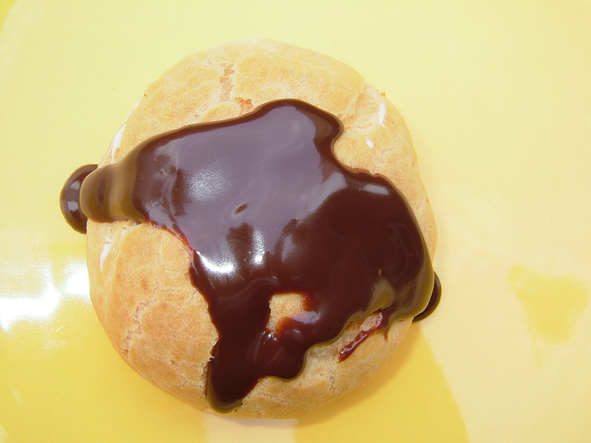 Profiterole nappée de chocolat